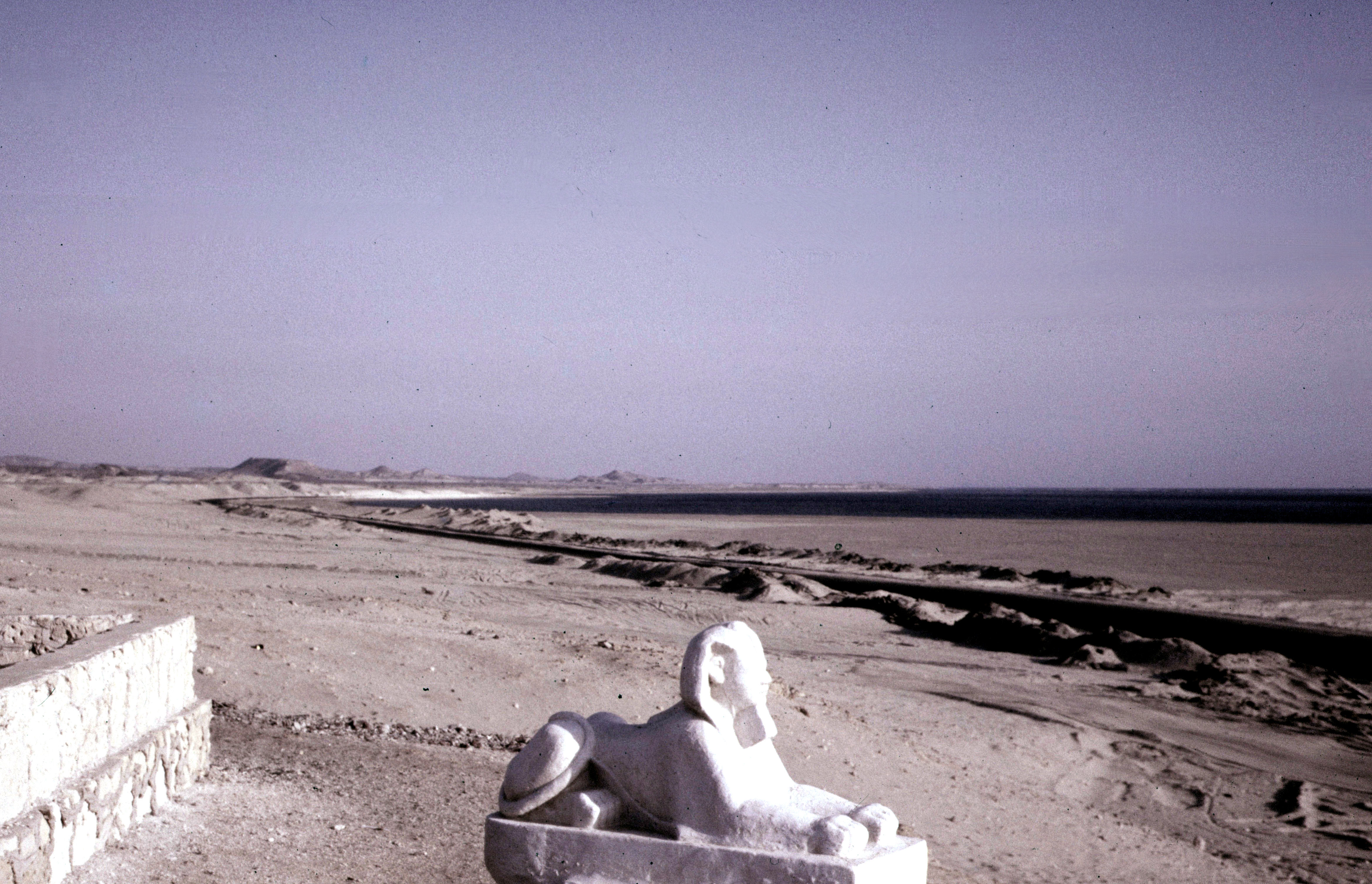 Blick vom Strandhaus Marsa Alam nach NNW (1960)